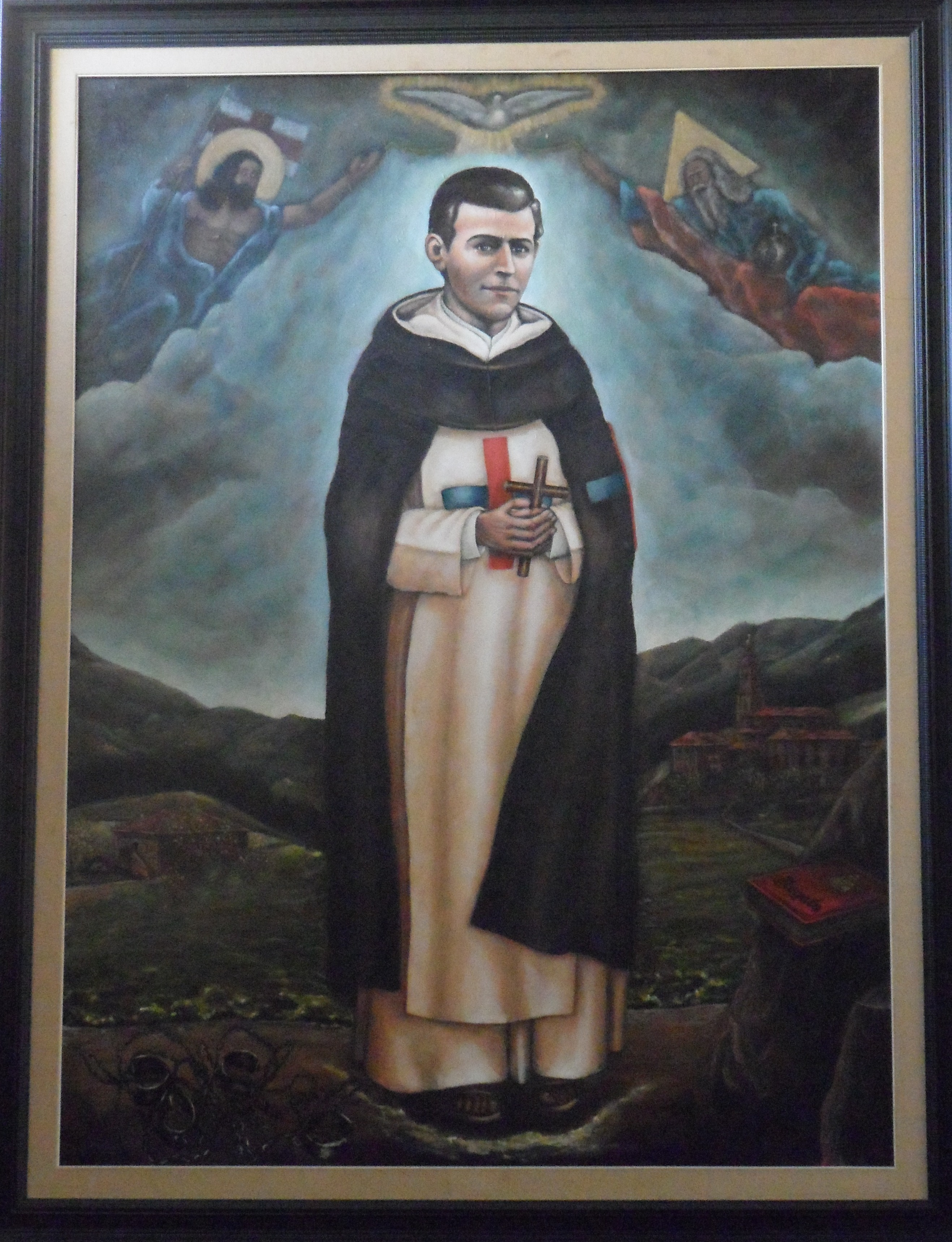 Beato Domingo Iturrate. Lienzo venerado en la Iglesia de la Santísima Trinidad de Algorta, España.